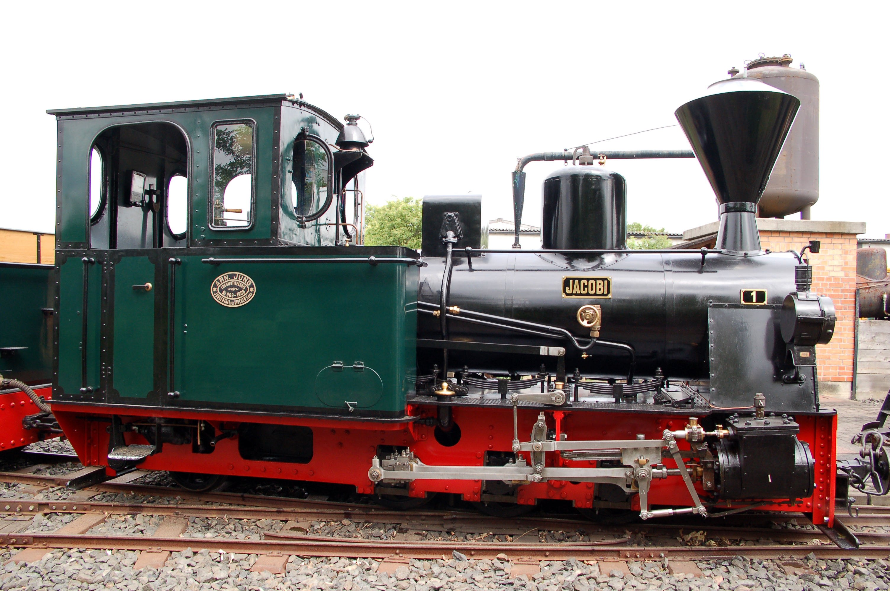 Dampflokomotive 99 3351 des Feldbahnmuseum Frankfurt am Main.